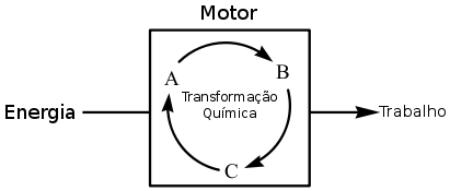 Esquema Termodinâmico do ciclo de funcionamento de um motor molecular